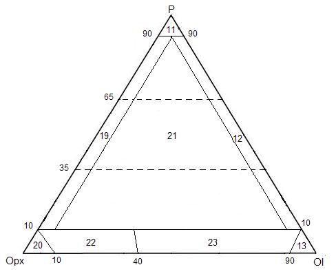 trójkąt C - noryty